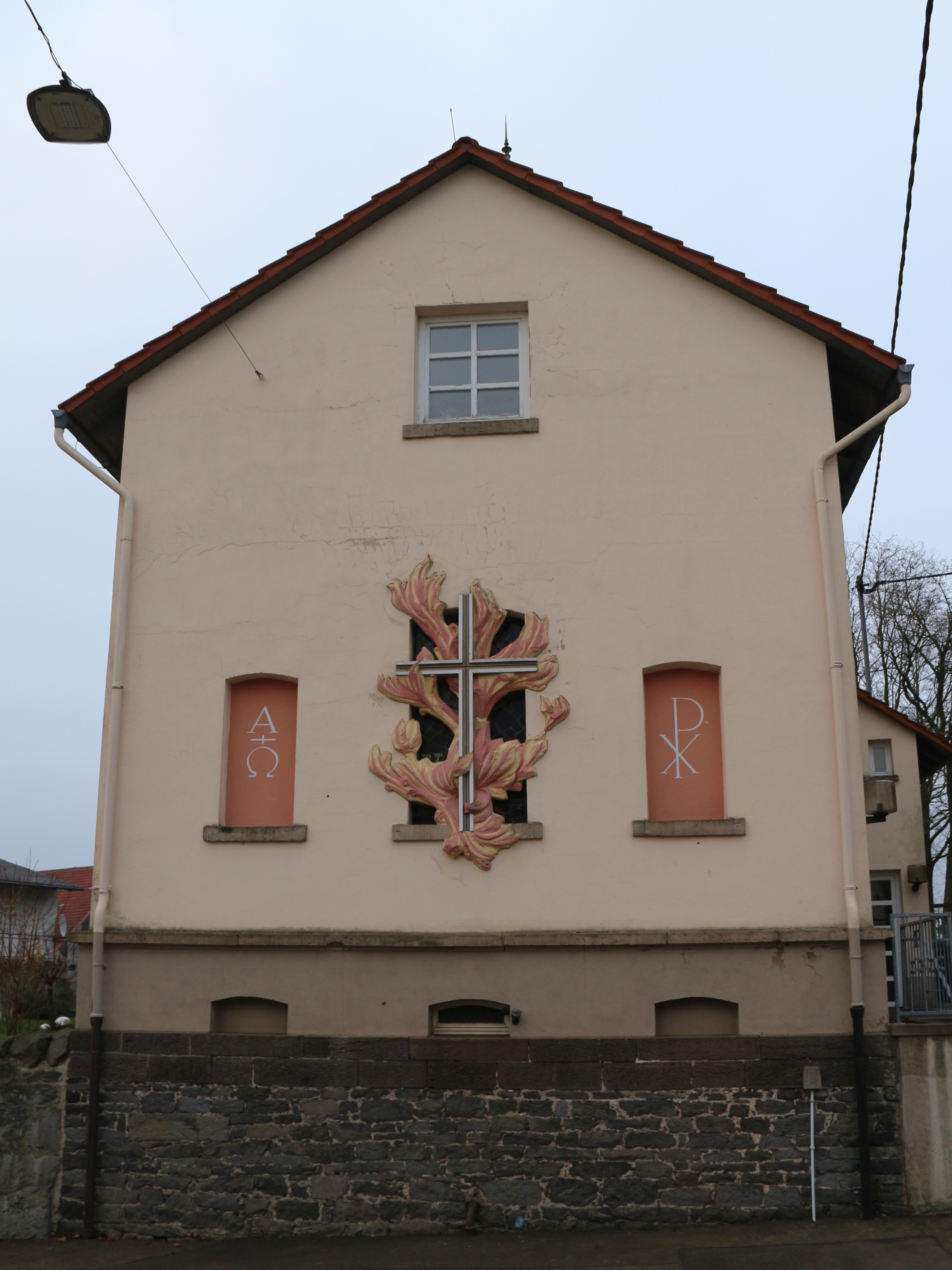 Kirche